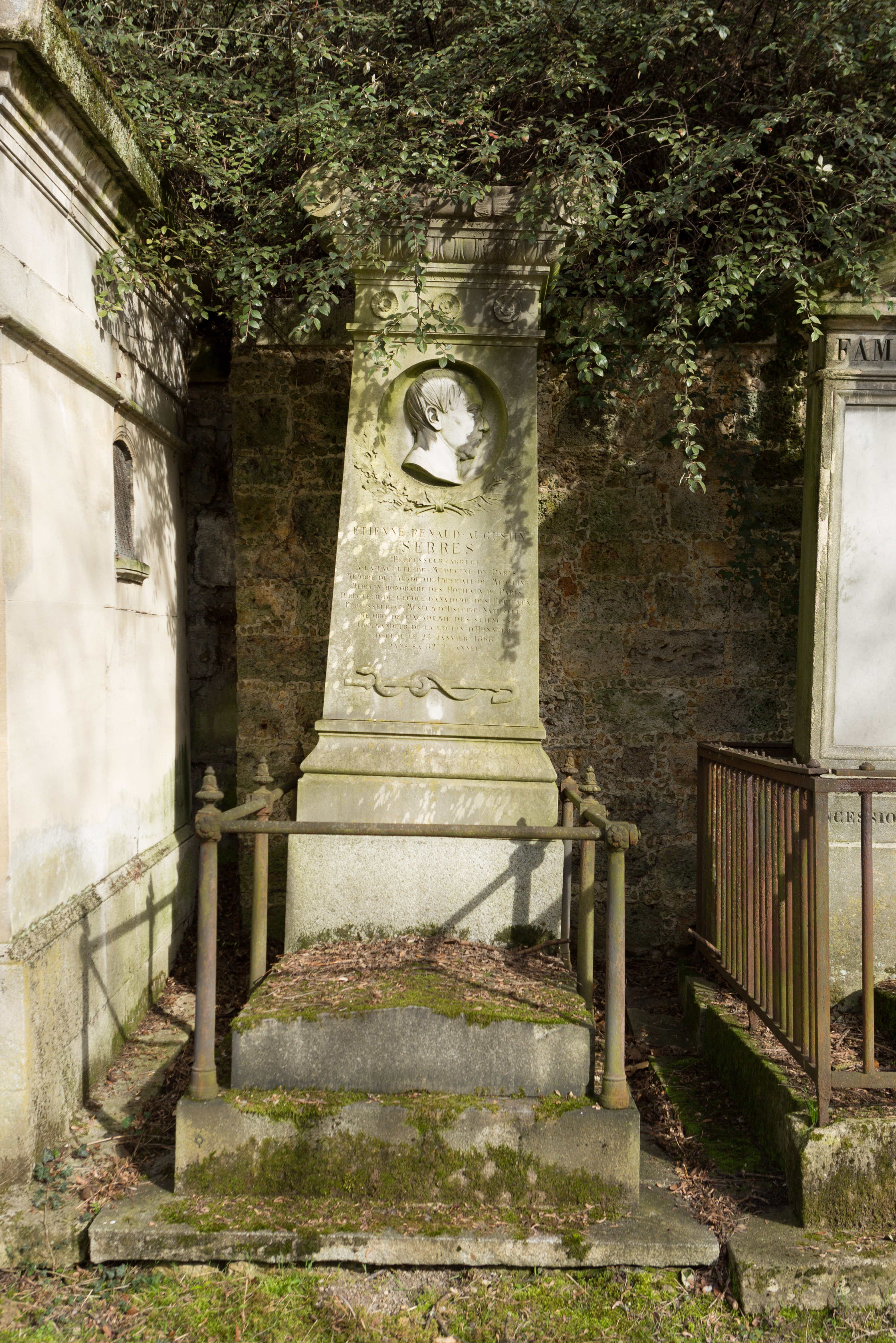 Monument ornée d'un médaillon en marbre d'Adam-Salomon et d'une sculpture décorative de Lebègue.